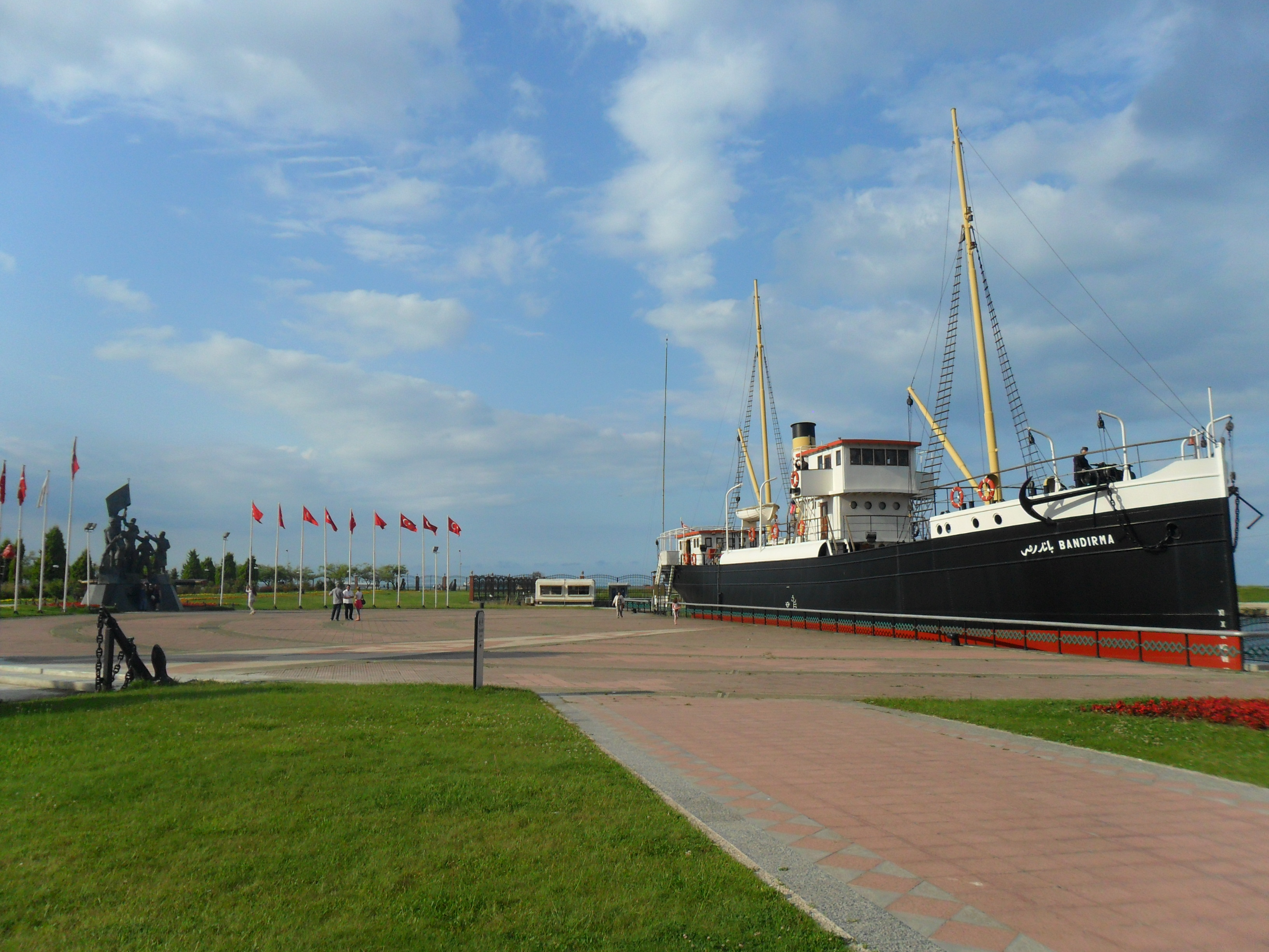 Samsun'un Canik ilçesinde yer alan Bandırma Vapuru ve Millî Mücadele Parkı Açık Hava Müzesindeki birebir Bandırma Vapuru kopyası ve Millî Kurtuluş Anıtı.